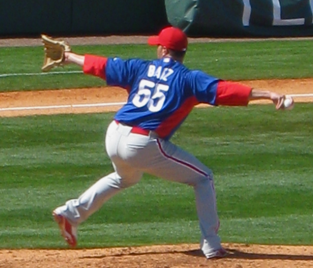 Danys Báez